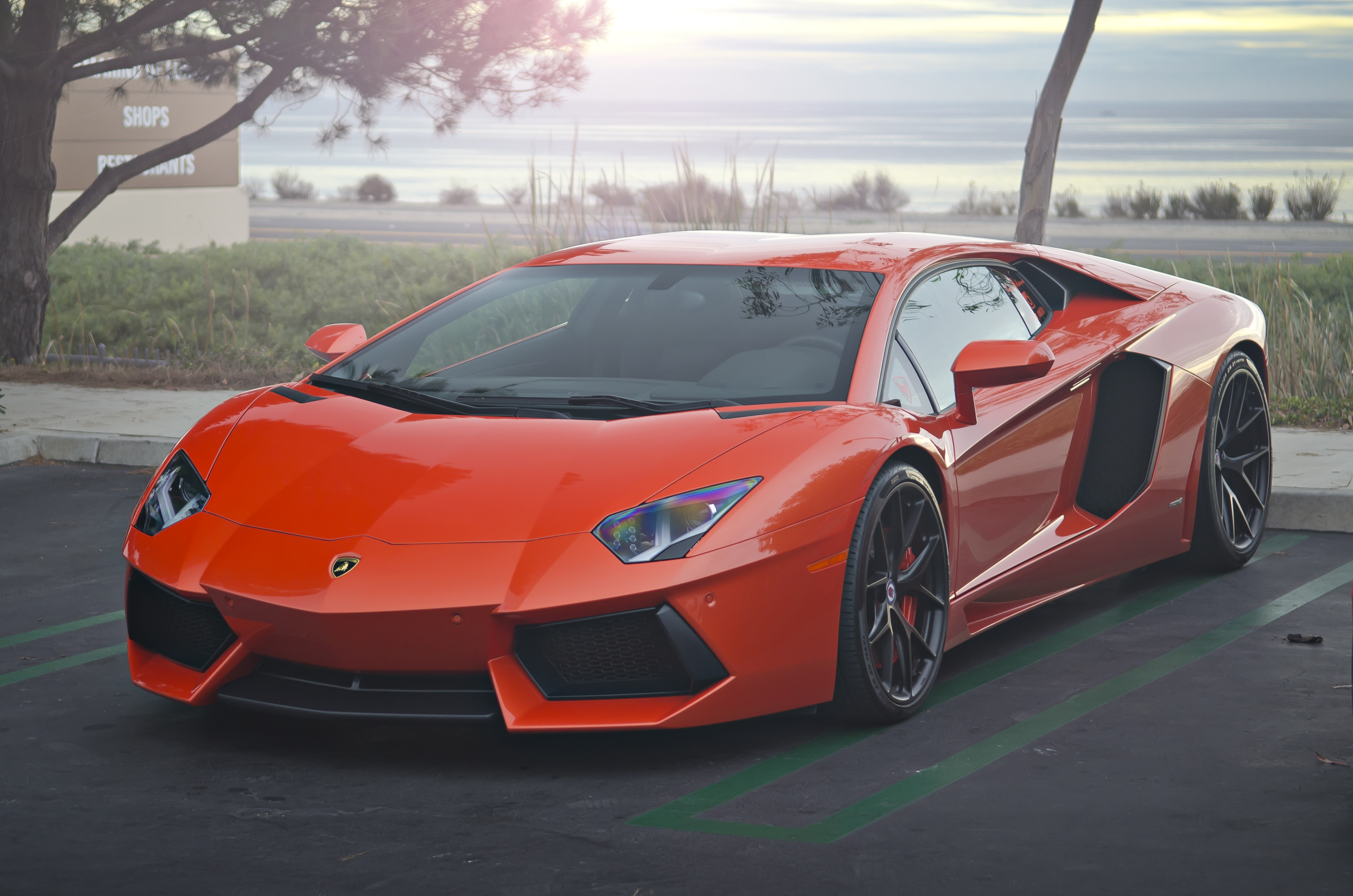 Arancio Argos (Orange) Lamborghini Aventador LP700-4 on HRE P101 Wheels.